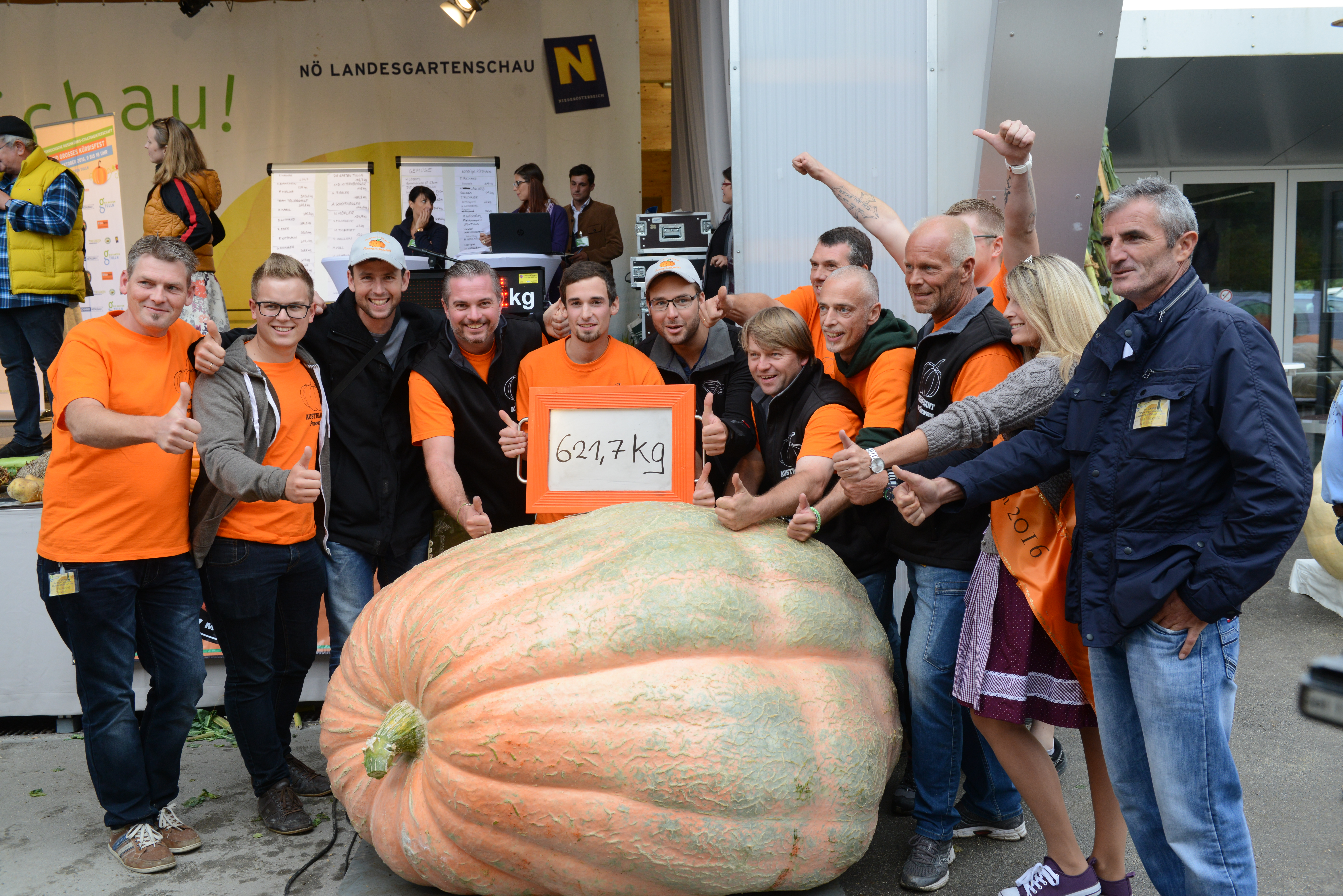 Staatsmeisterschaft 2016 in Tulln